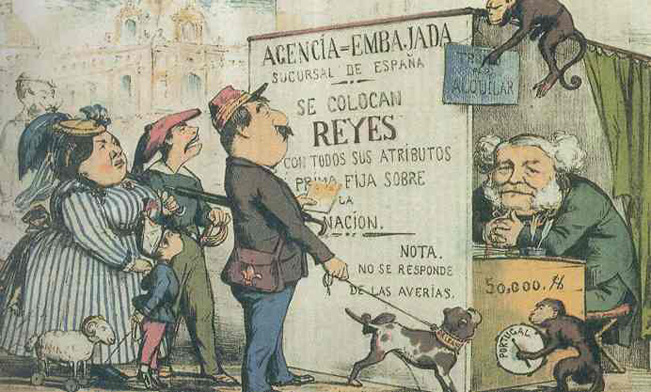 Caricatura aparecida en La Flaca sobre la sucesión monarquica en la españa de la época.